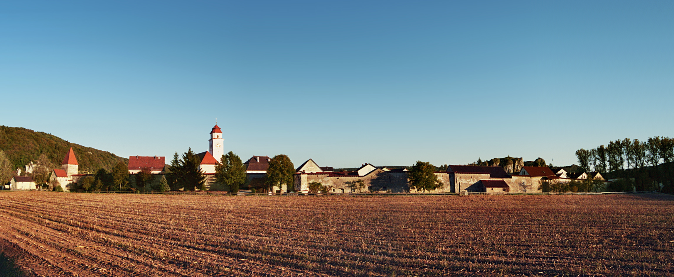 Dollnstein, Altmühltal, Bayern: Die weitgehend erhaltene Befestigung des Marktes bietet einen heute bereits sehr seltenen, unverbauten Anblick.